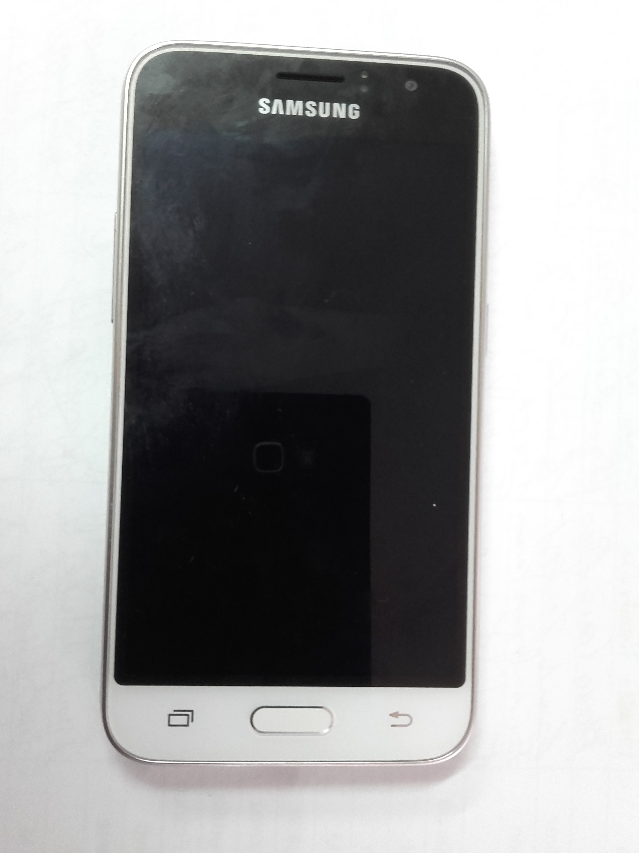 teles